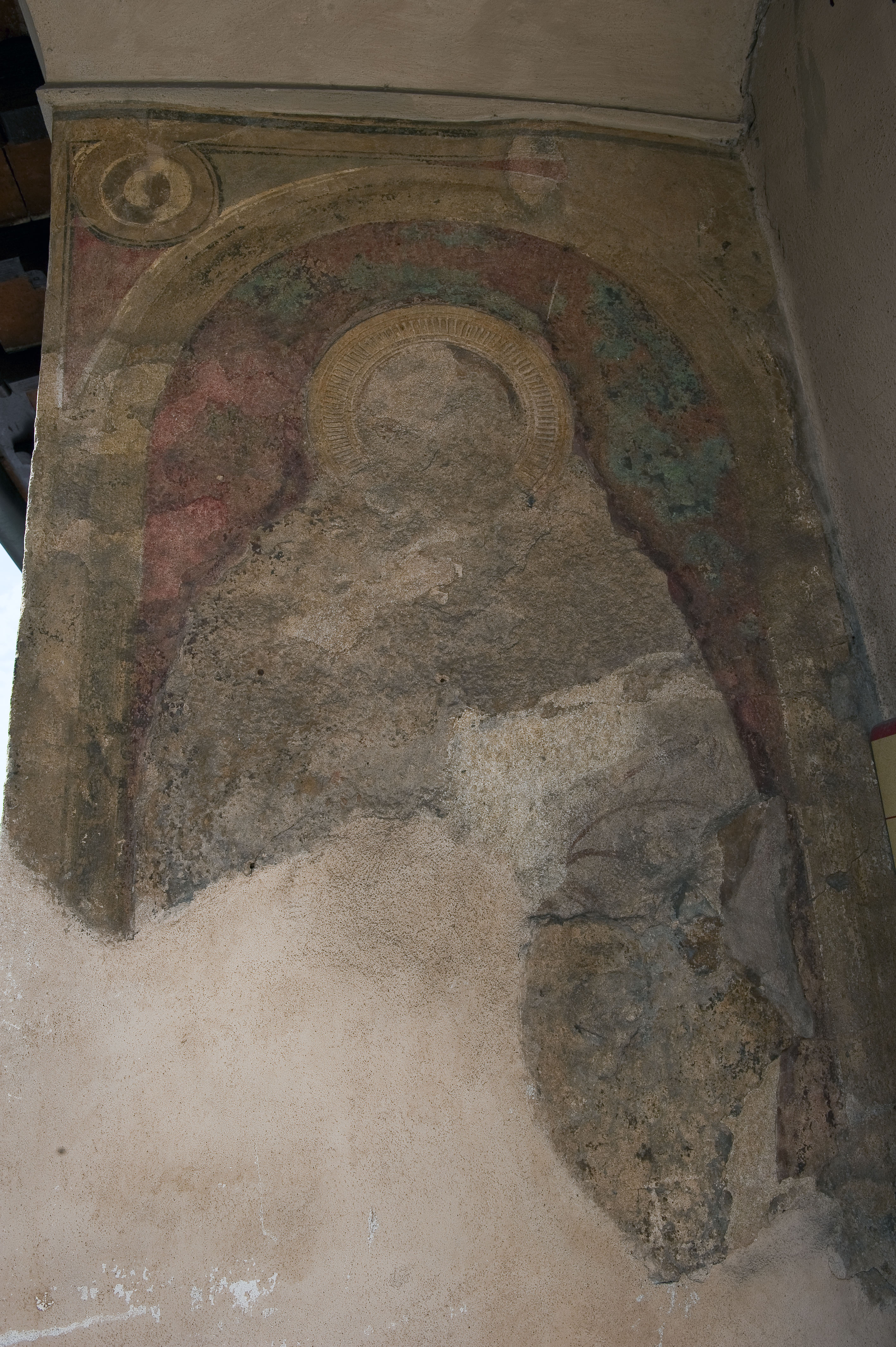 Sant'Antonio abate. Affresco del Mastro di Signa posto nel Tabernacolo del Podestà (Bagno a Ripoli)